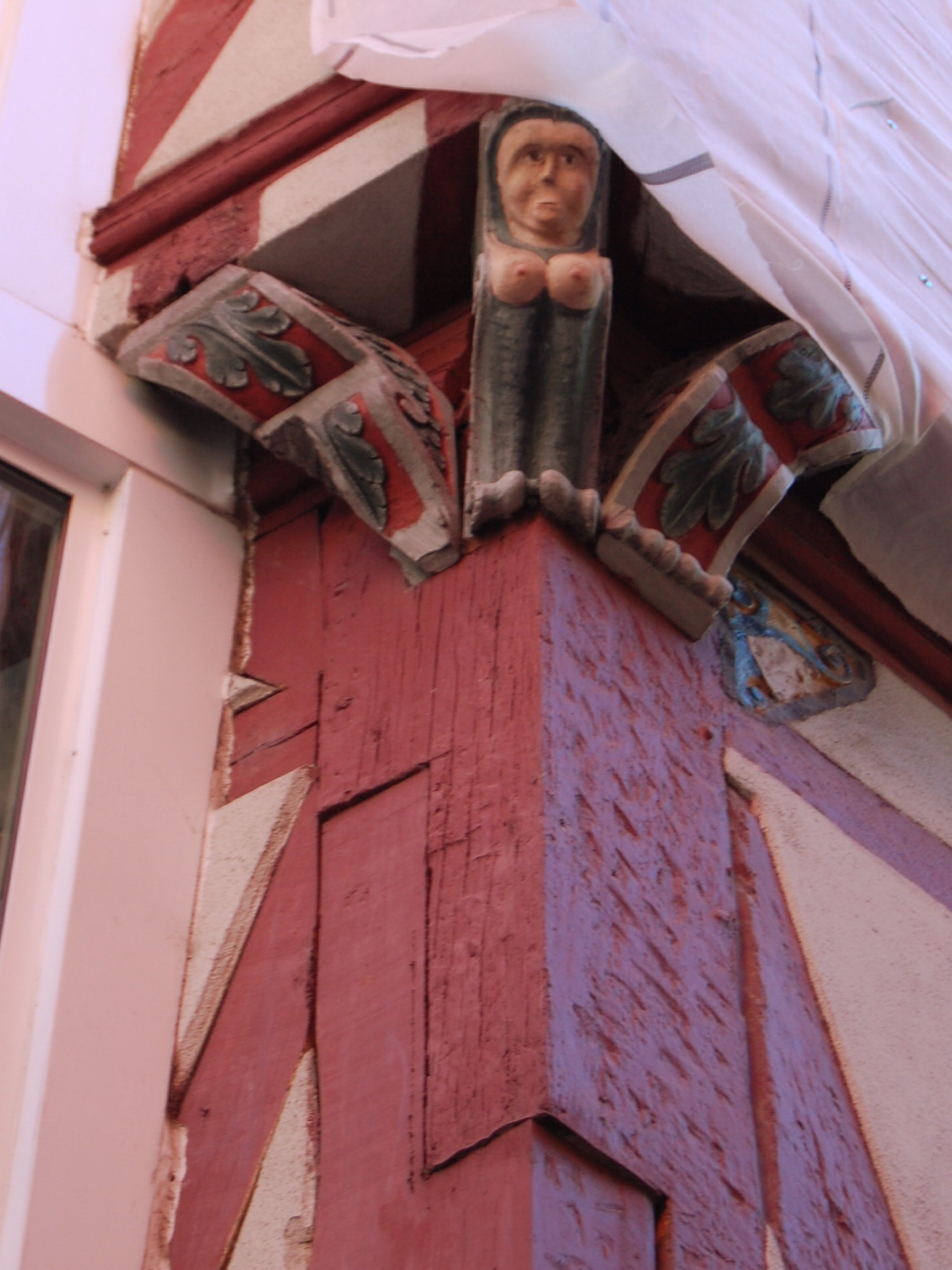 Ozdoby budynku